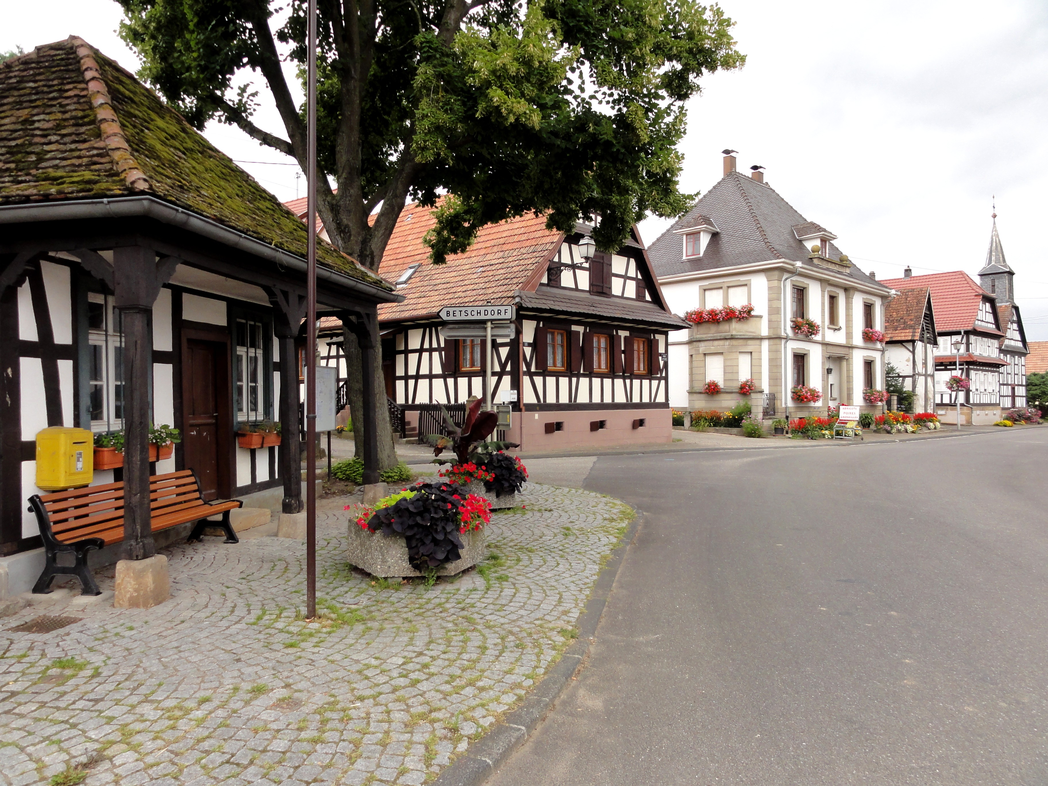 Alsace, Bas-Rhin, Betschdorf-Kuhlendorf, Ancien corps de garde (XIXe), rue principale. .